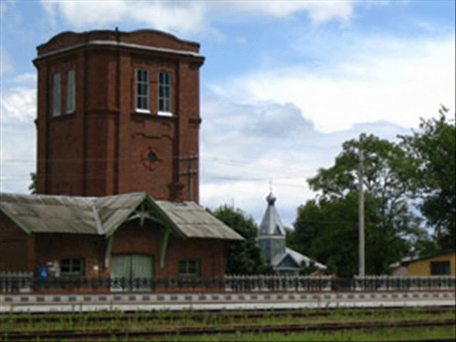 Башня водонапорная железнодорожной станции. Построена в 1896 году.